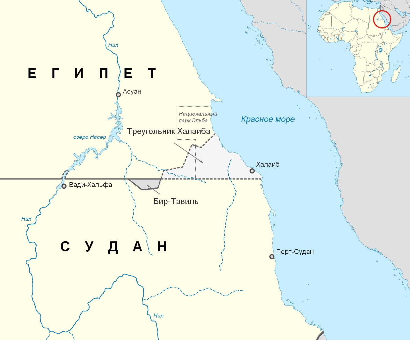 Расположение треугольника Халаиба